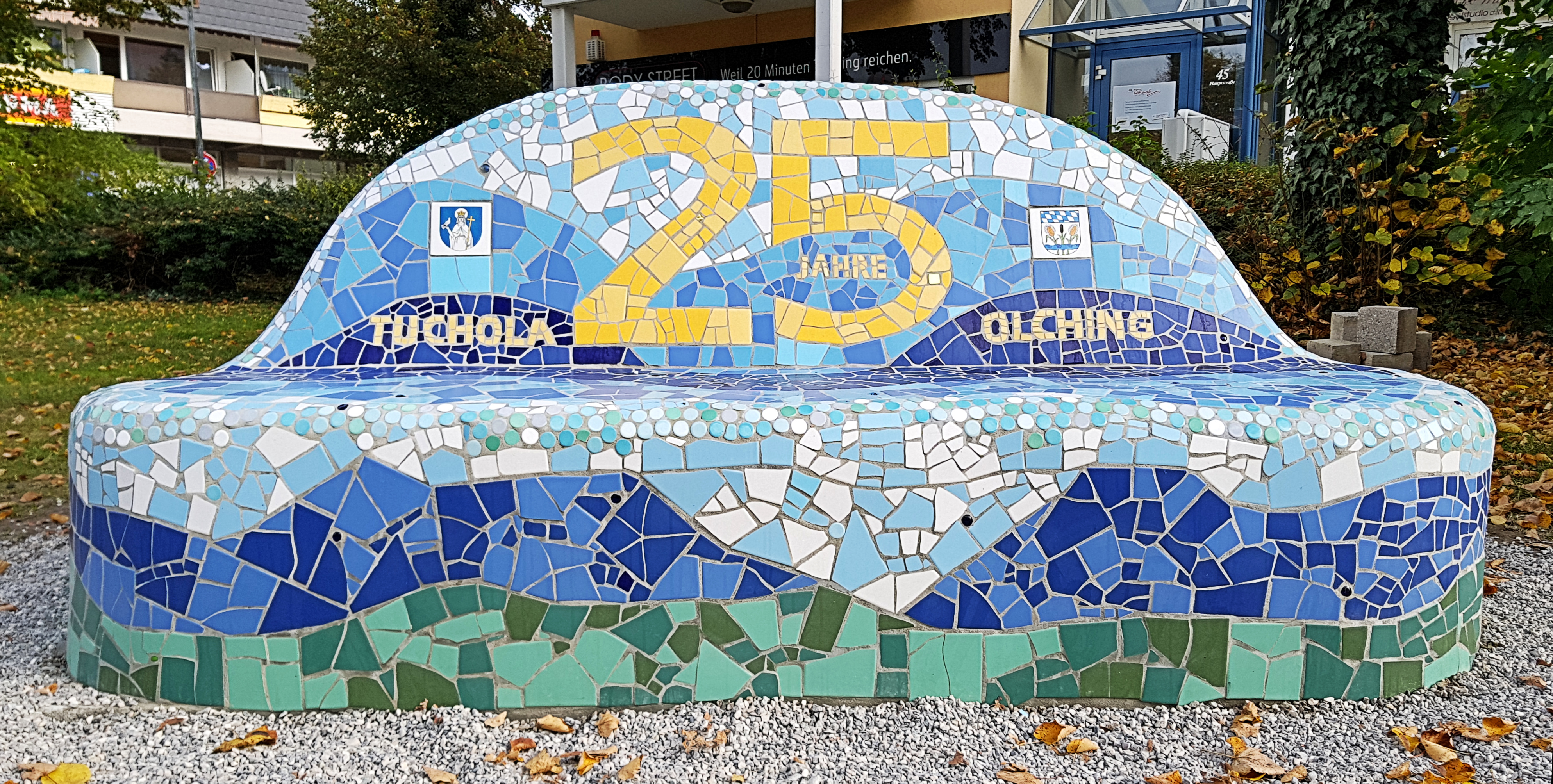 Deutschland, Bayern, Oberbayern, Landkreis Fürstenfeldbruck, Gemeinde Olching, Keramikbank zum Gedenken an 25 Jahre Städtepartnerschaft mit der polnischen Gemeinde Tuchola, eingeweiht am 18. Oktober 2019, gestaltet vom Mosaikkünstler Heinz Krautwurst und seiner Frau